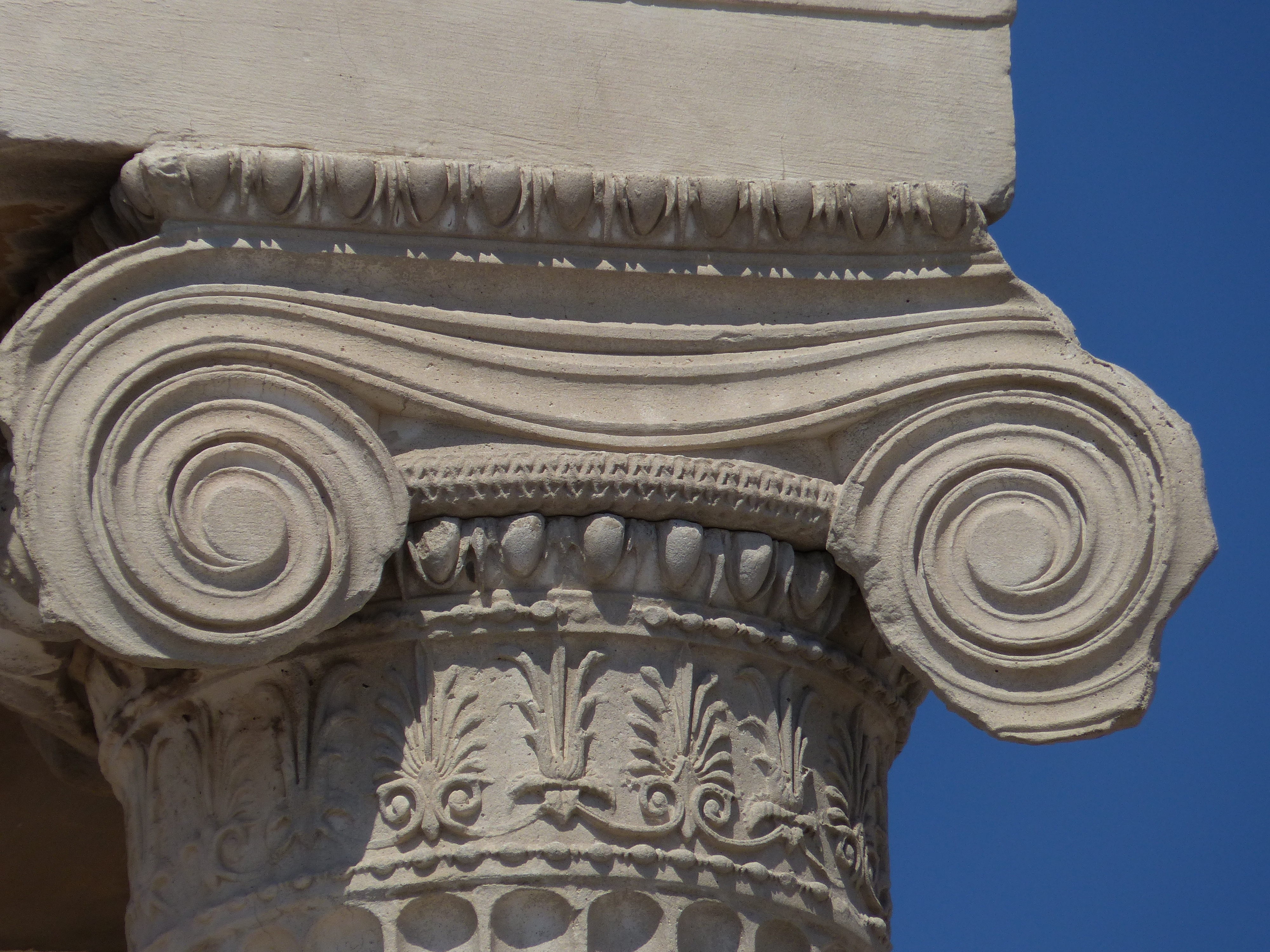 Capiteles de la fachada este del Erecteón, Atenas, Grecia, 2019